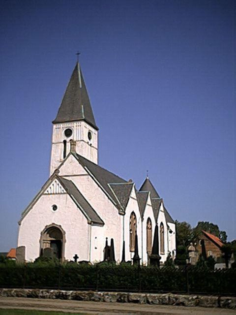 Description: Church of Valleberga in Skåne, Sweden Photographer: User:Väsk License: GFDL